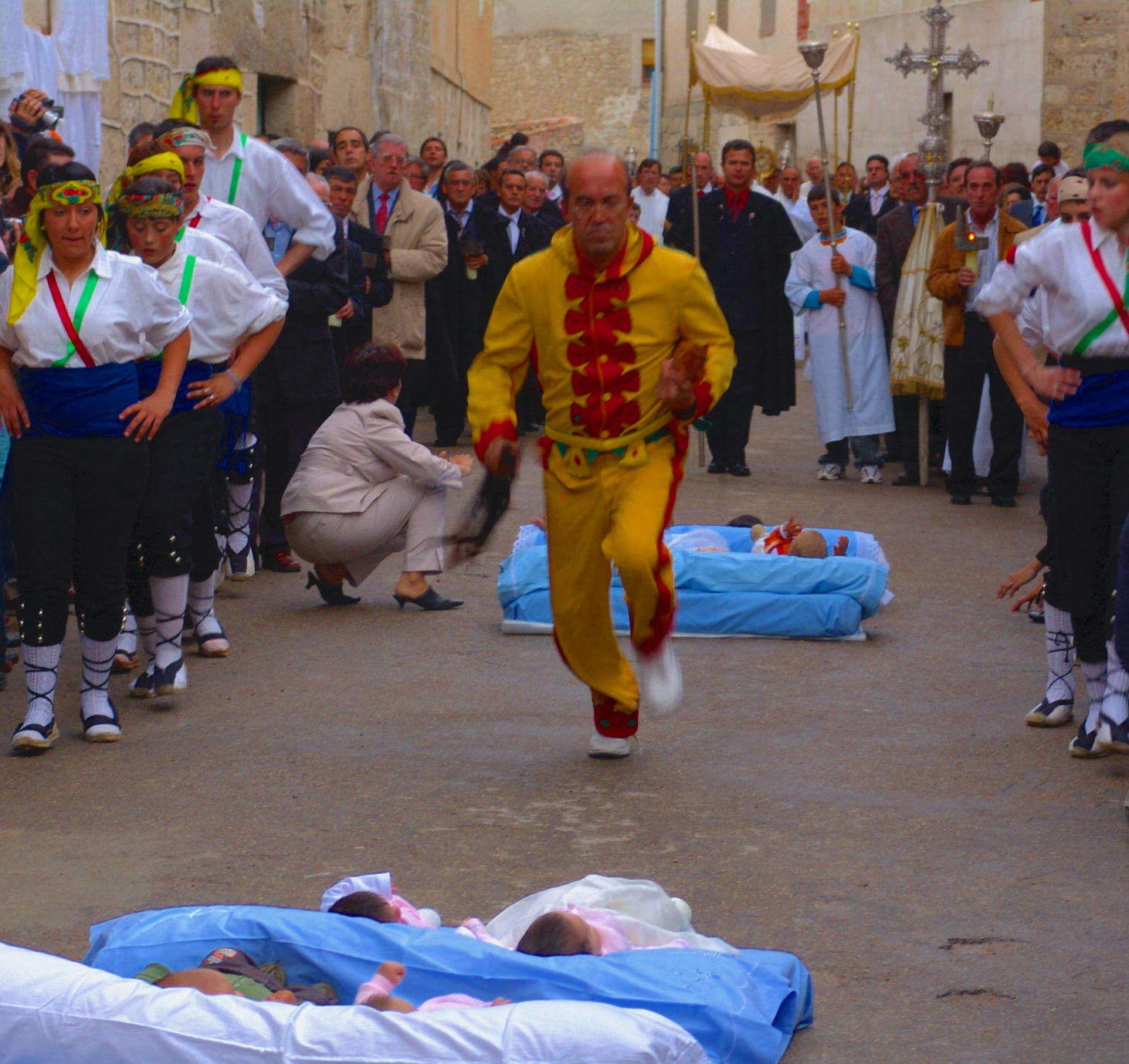 El Colacho, entre los danzantes, salta sobre los recién bautizados, Castrillo de Murcia, sasamón, Burgos, España